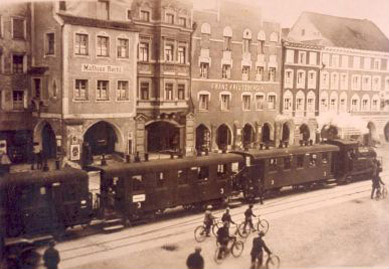 Neuötting Stadtplatz 1906